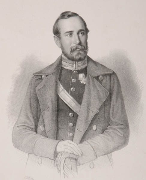 Bildnis von Hermann von Tresckow (1818-1900); Hornemann, Friedrich Adolf (Künstler); lith. Institut Charles Fuchs (Hersteller); 1849; Archiv: Schleswig-Holsteinische Landesbibliothek